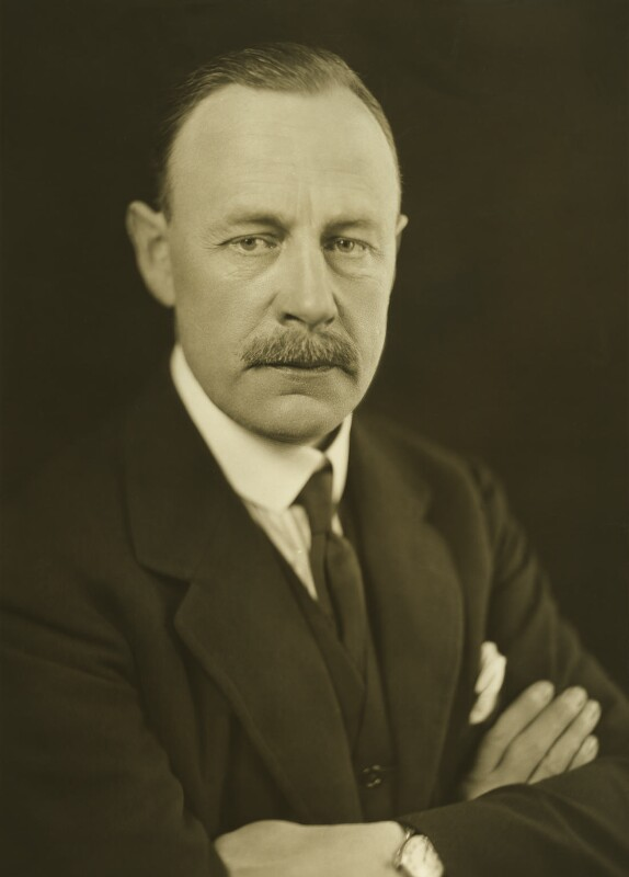 Lord O'hagan